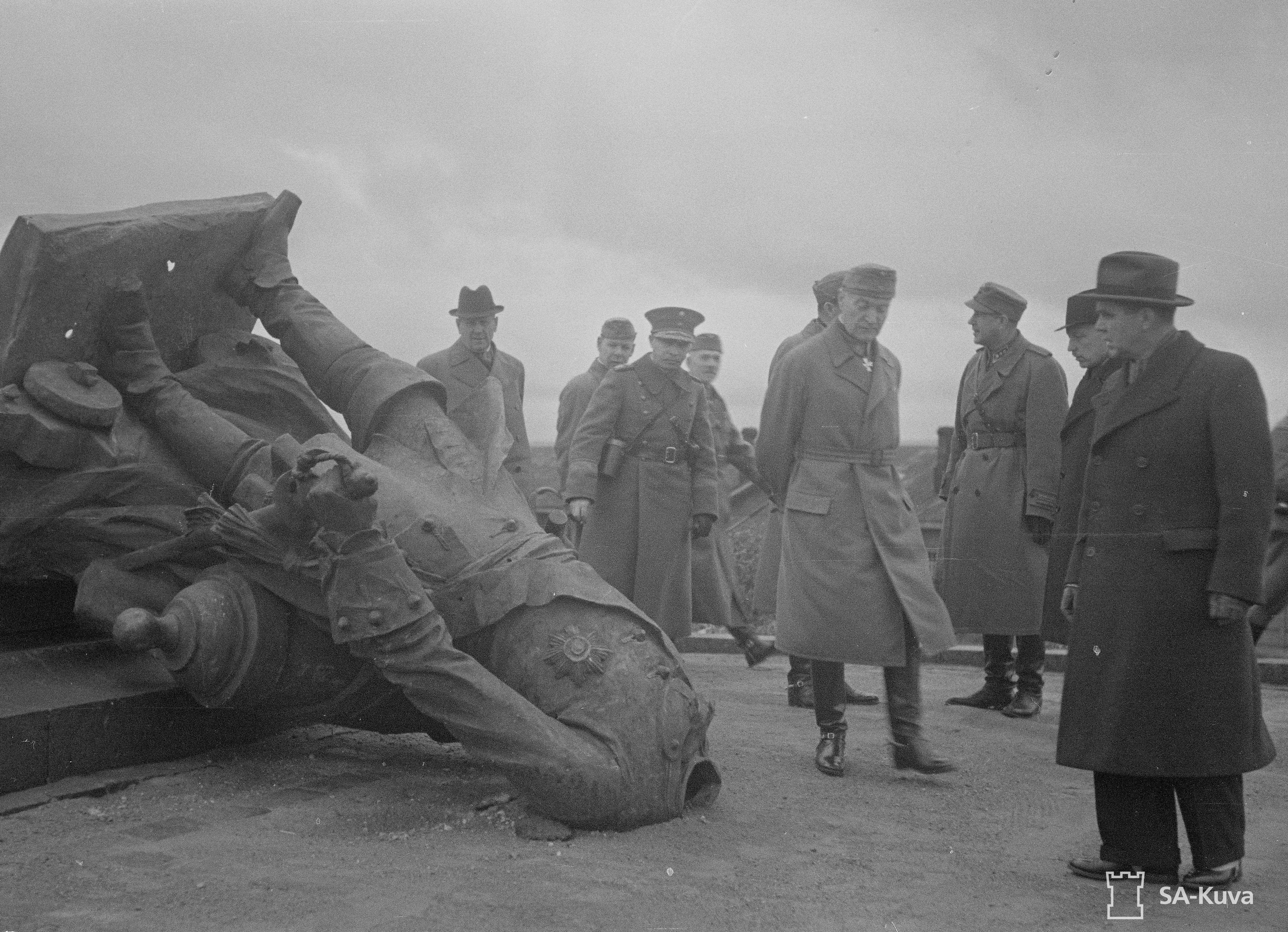 У памятника Петру Первому